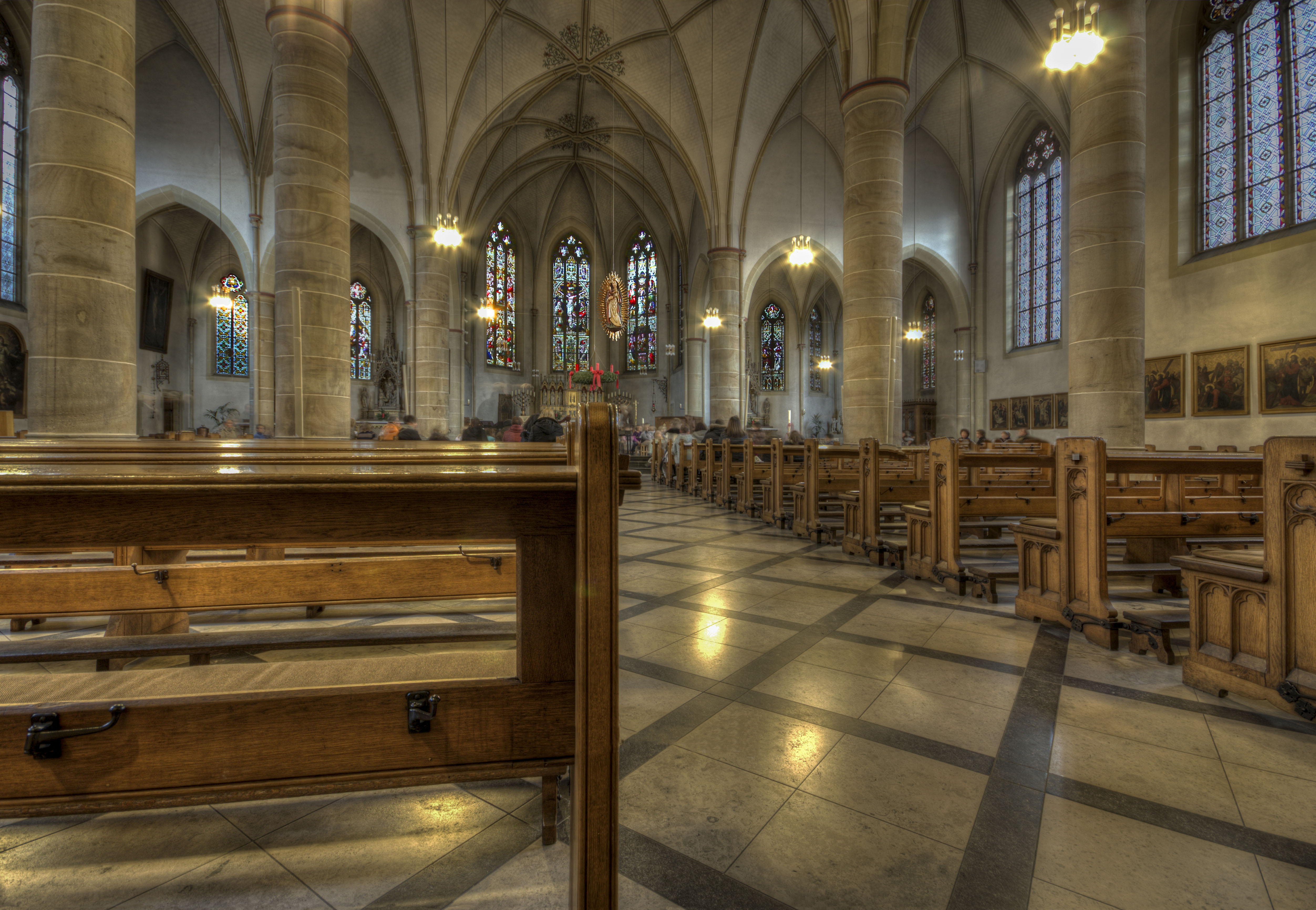 Ahlen St. Bartholomäus, Innenansicht